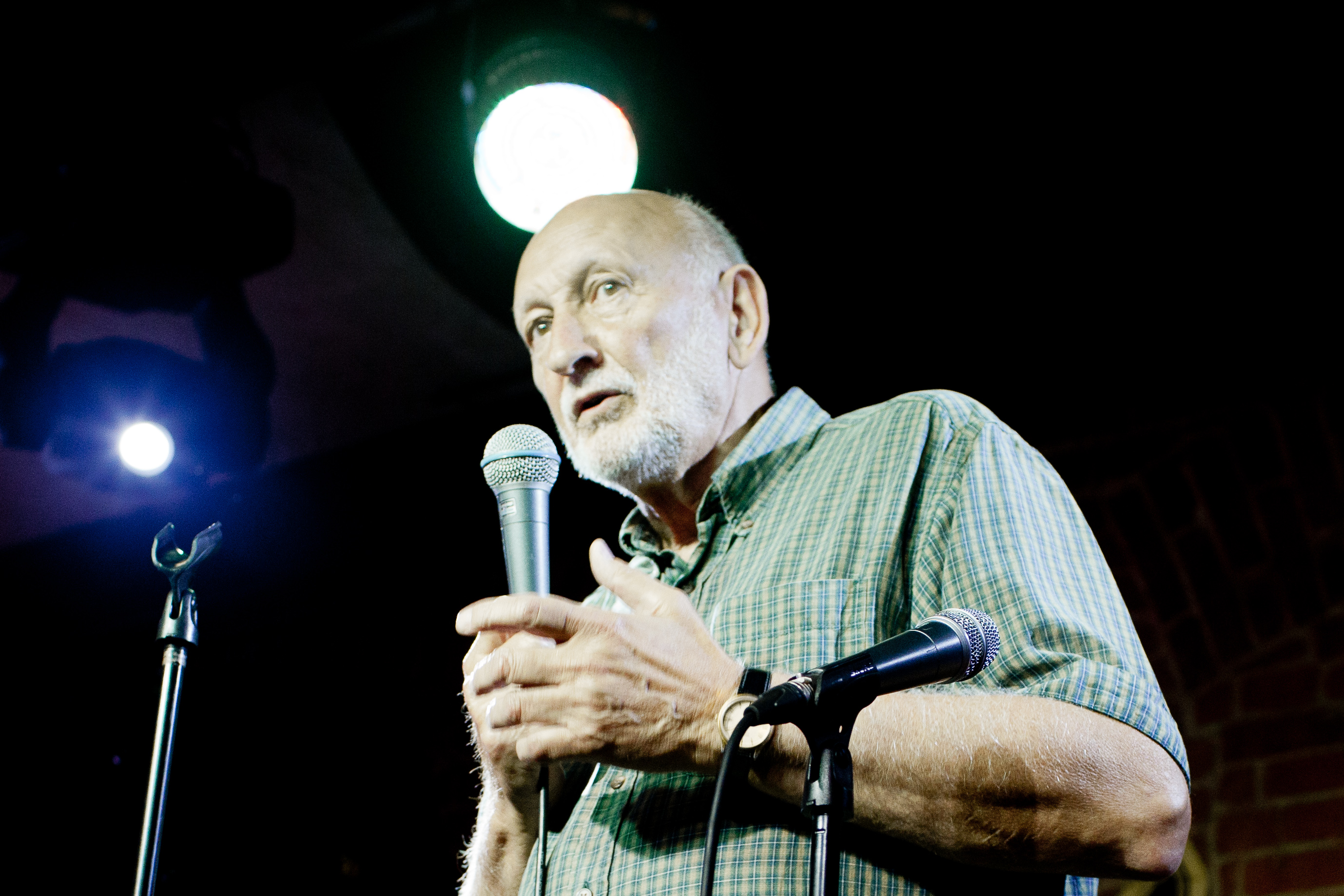 Фестиваль Leo Records в Джаз-кафе "Эссе", 2013. Лео Фейгин